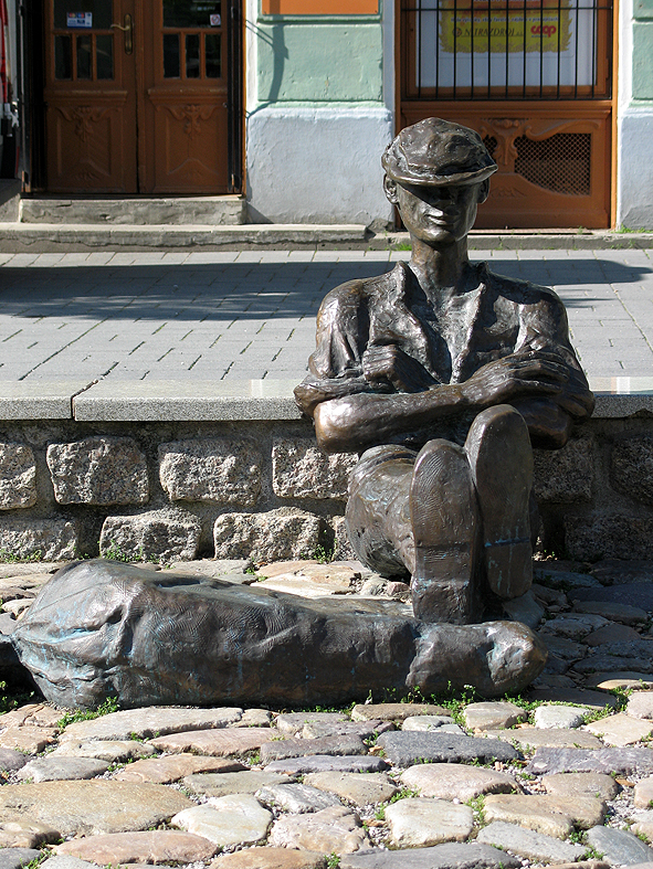 Bronzová plastika v Topoľčanoch Žochár.